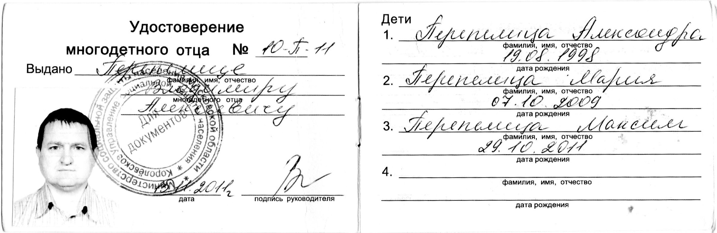 Удостоверение многодетного отца выданное в городе Королёв Московской области в 2011 году